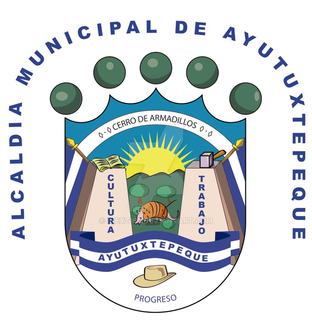 Escudo del municipio de Ayutuxtepeque, El Salvador